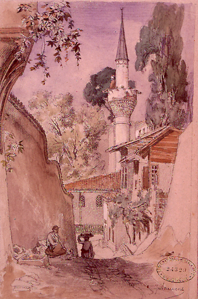 Les rives du Bosphore. Yeniköy. Mine de plomb, aquarelle et crayon gras.